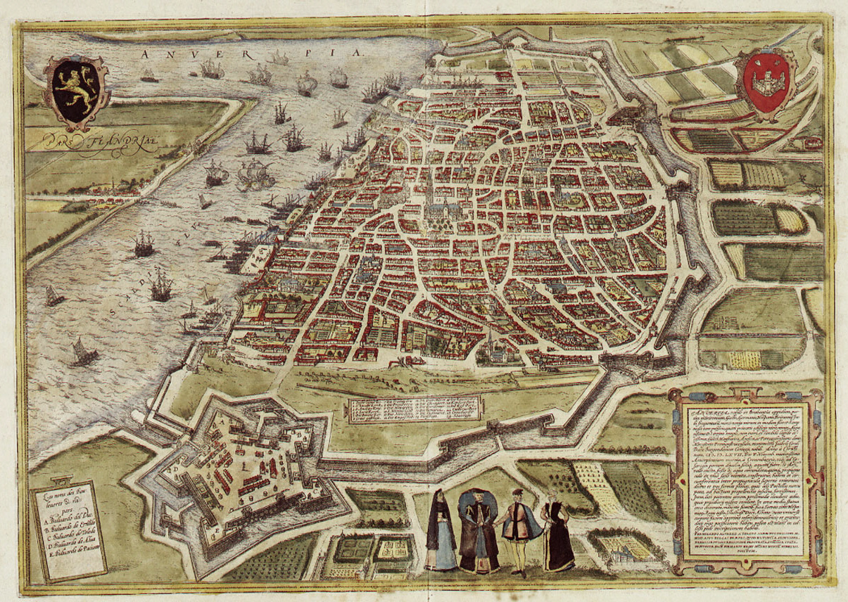 Antwerpen